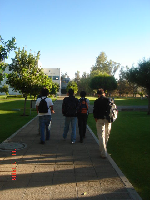 El campus del CUCEA A view of my University's campus, featuring some students on their way to their classes. Taken by me on March 30, 2006.